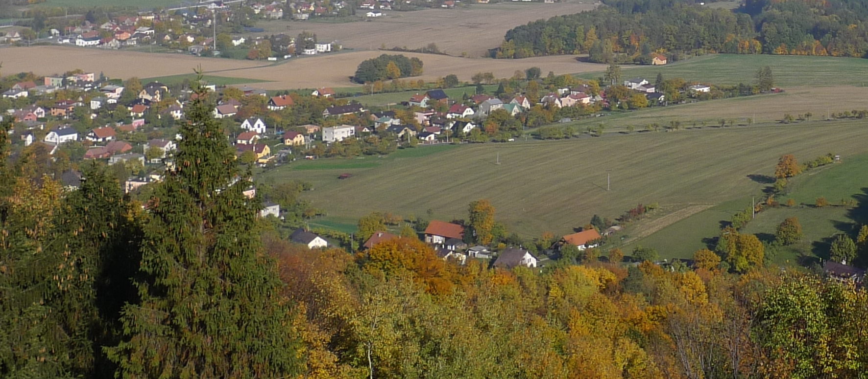 Chlebovice z rozhledny Panorama